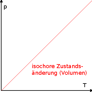 Isochore Zustandsänderung im p-T-Diagramm